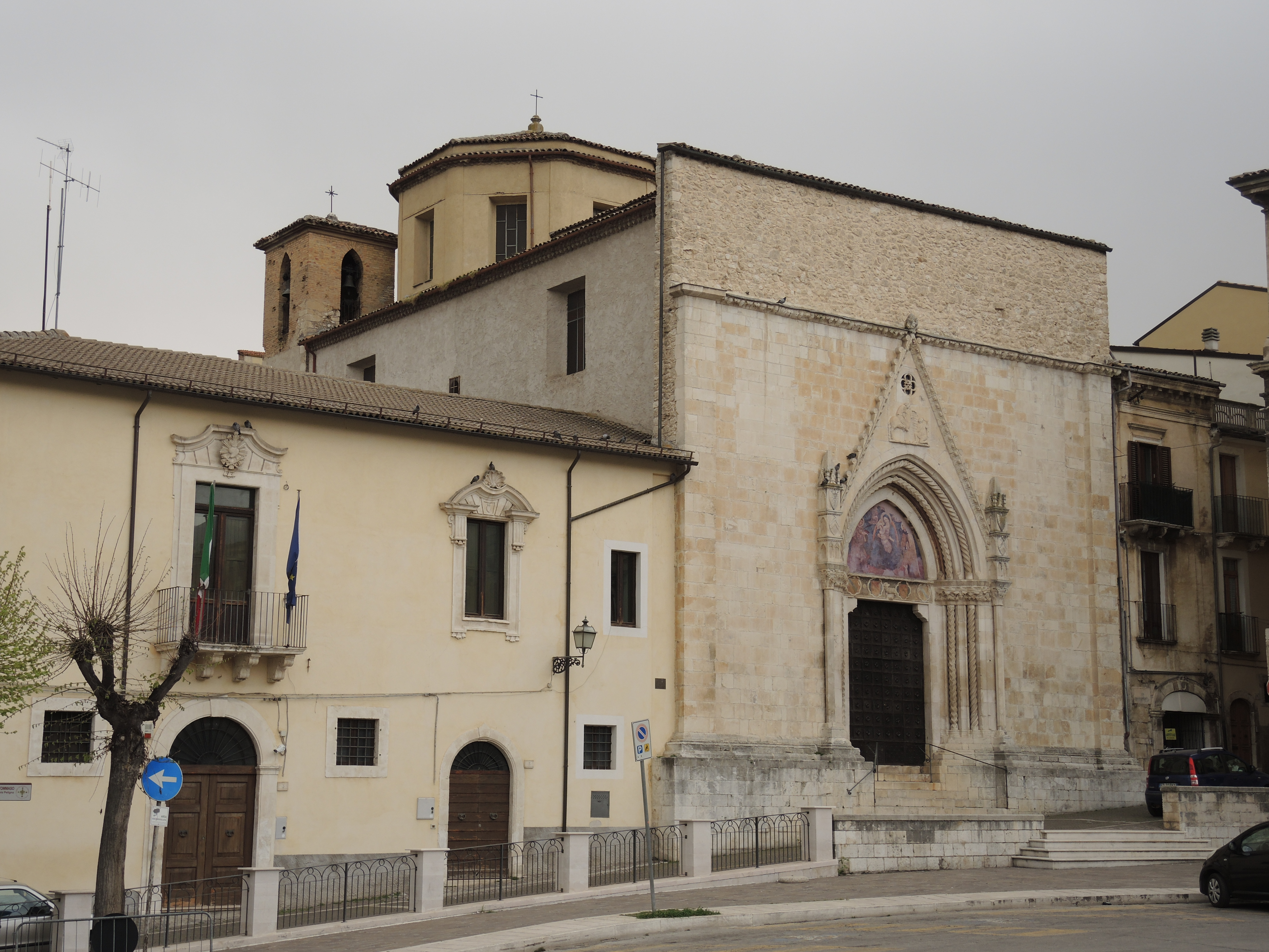 Sulmona: Chiesa di San Filippo Neri